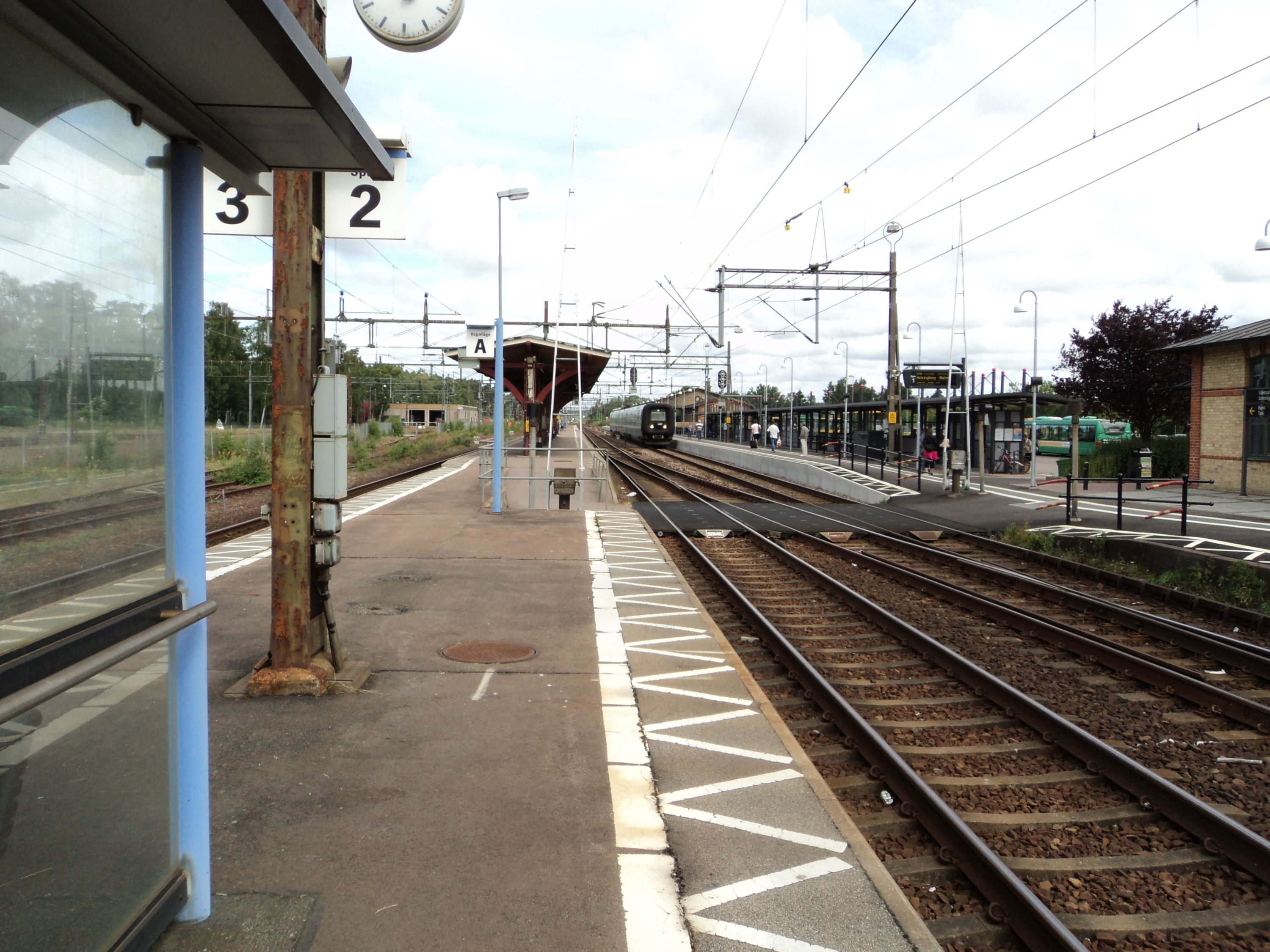 Ängelholms station på Västkustbanan i juli 2010. Stationen byggdes om under 2009 så att spår 1 anslöts till Västkustbanan. Inne på spår 1 inväntar ett X31-fordon i pågatågstrafik avgång mot Malmö